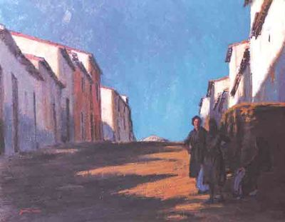 Rue à Aliseda